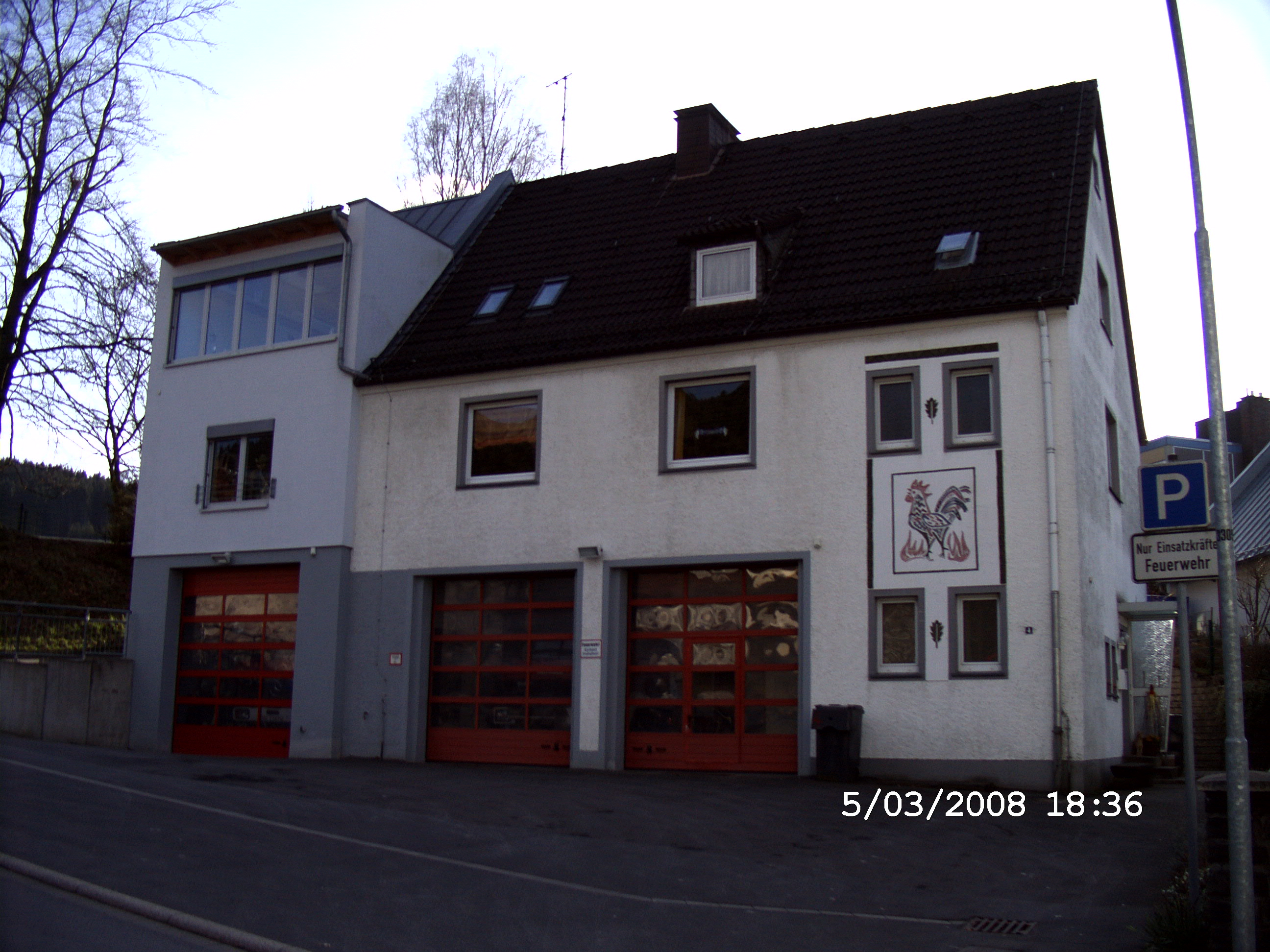 Feuerwehrgerätehaus Kleinhammer